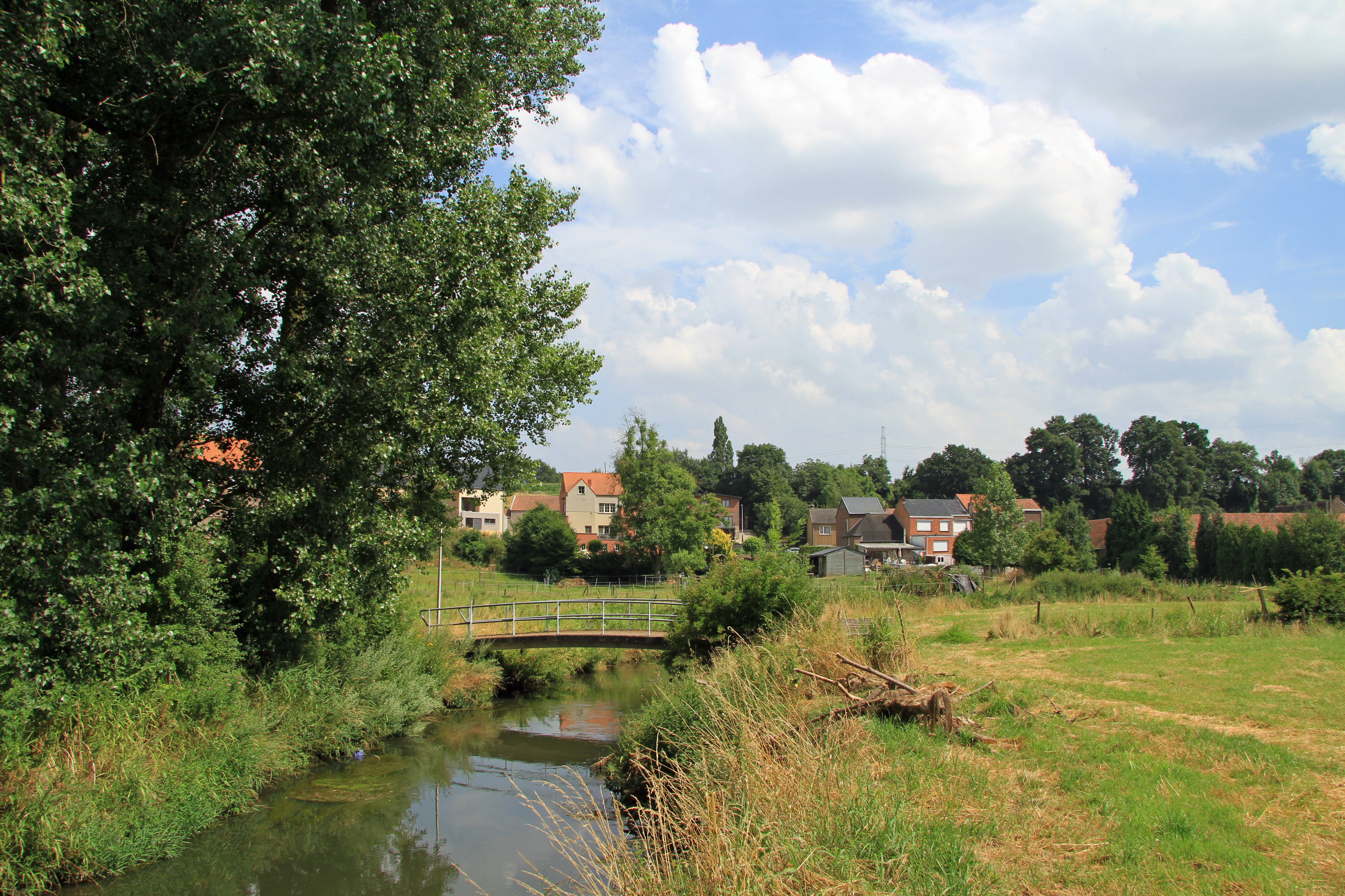 Jolie passerelle sur le Geer